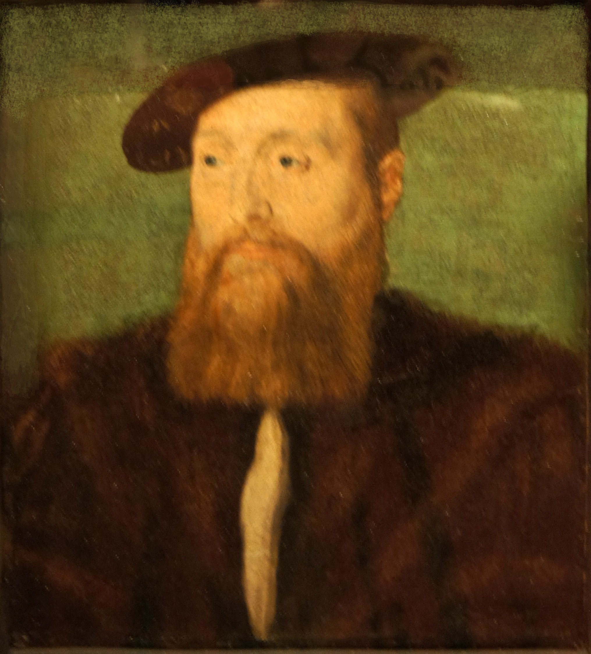 Par Corneille_de_Lyon_le portrait de comte de Nanteuil . Huile sur bois .